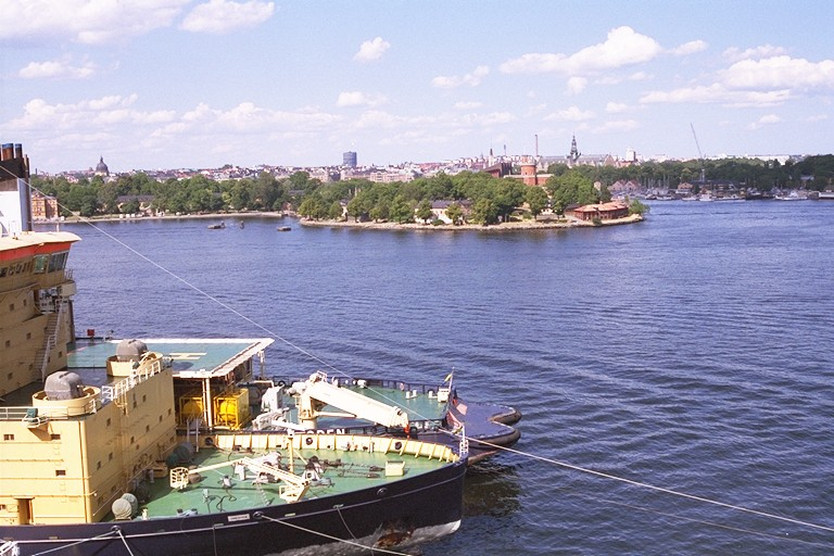 Vue op Stockholm